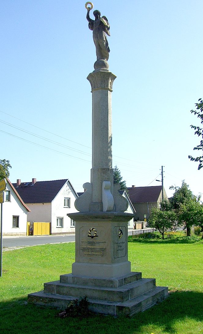 Stolzenhain, Deutschland, Denkmal für die Opfer des Deutsch-Französischen Krieges 1870/71.